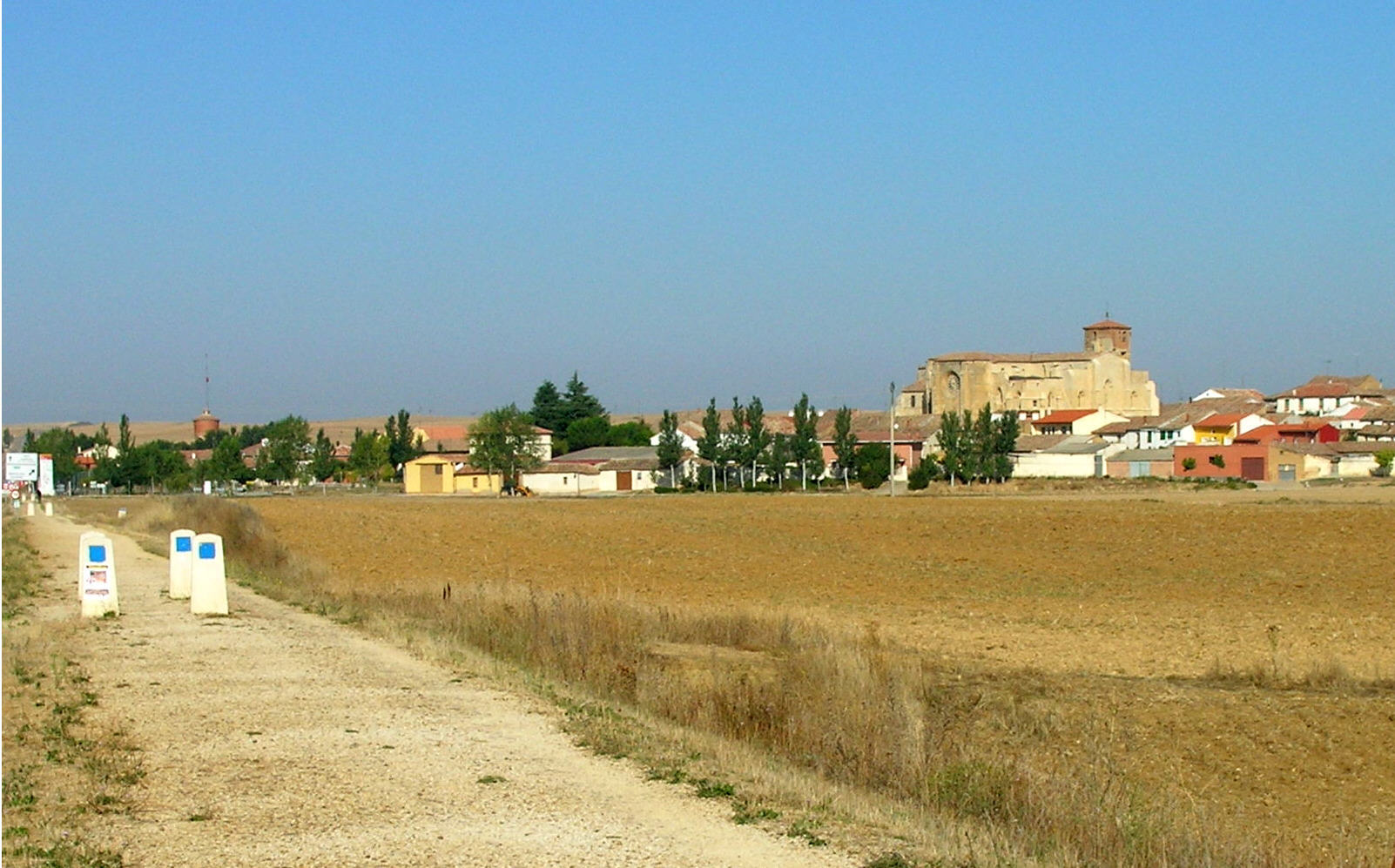 A tan solo 6 kilometros de Carrión de los Condes, se encuentra este pueblo con su impresionante iglesia templaria del siglo XIII.